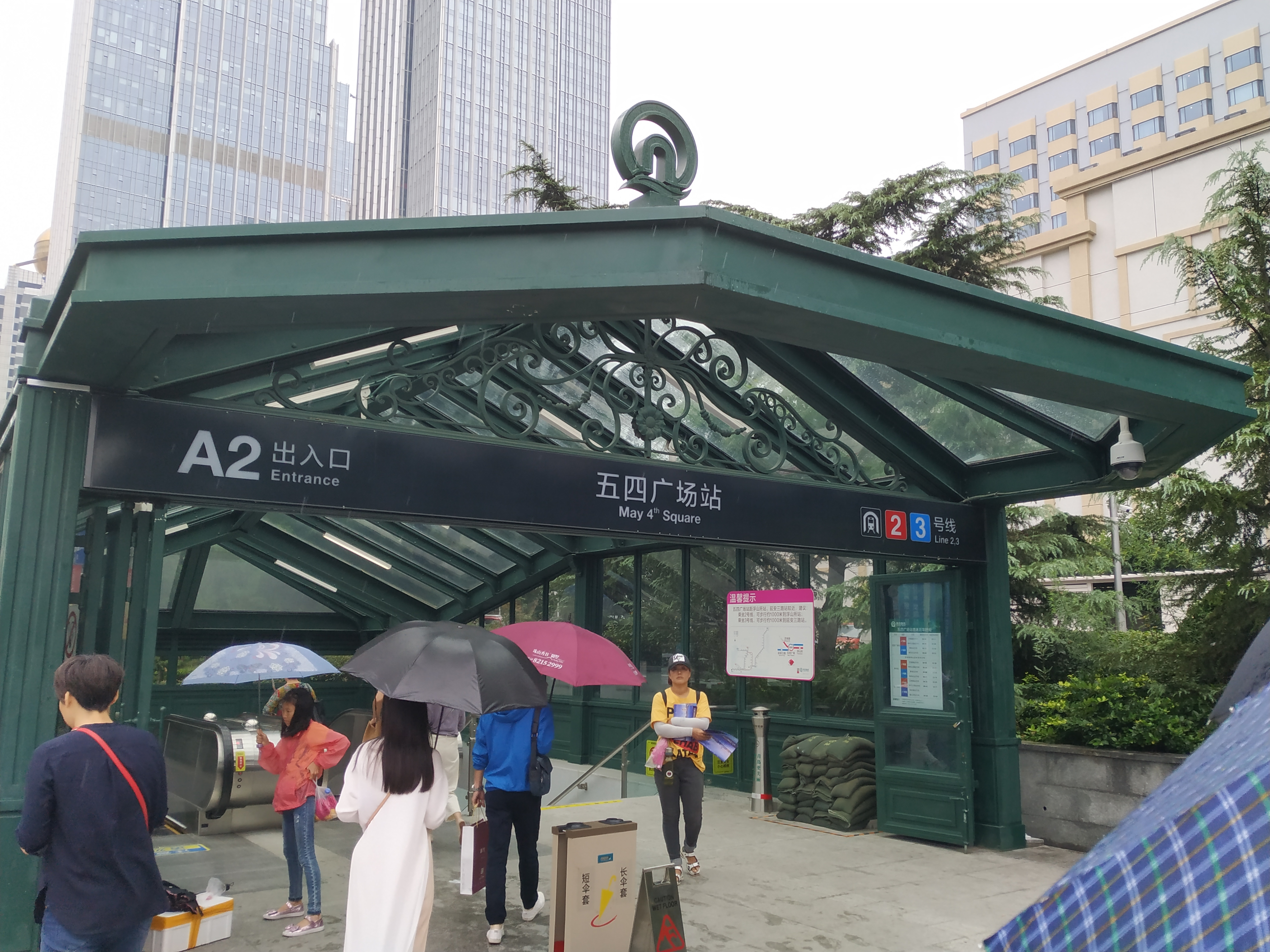 5-4 Gwangchang Jhan A2-chukou